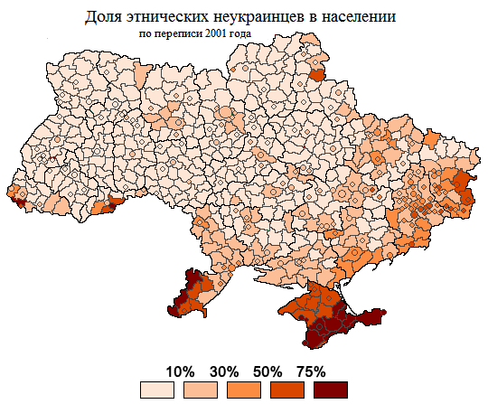 Доля этнических неукраинцев в населении Украины по переписи 2001 года